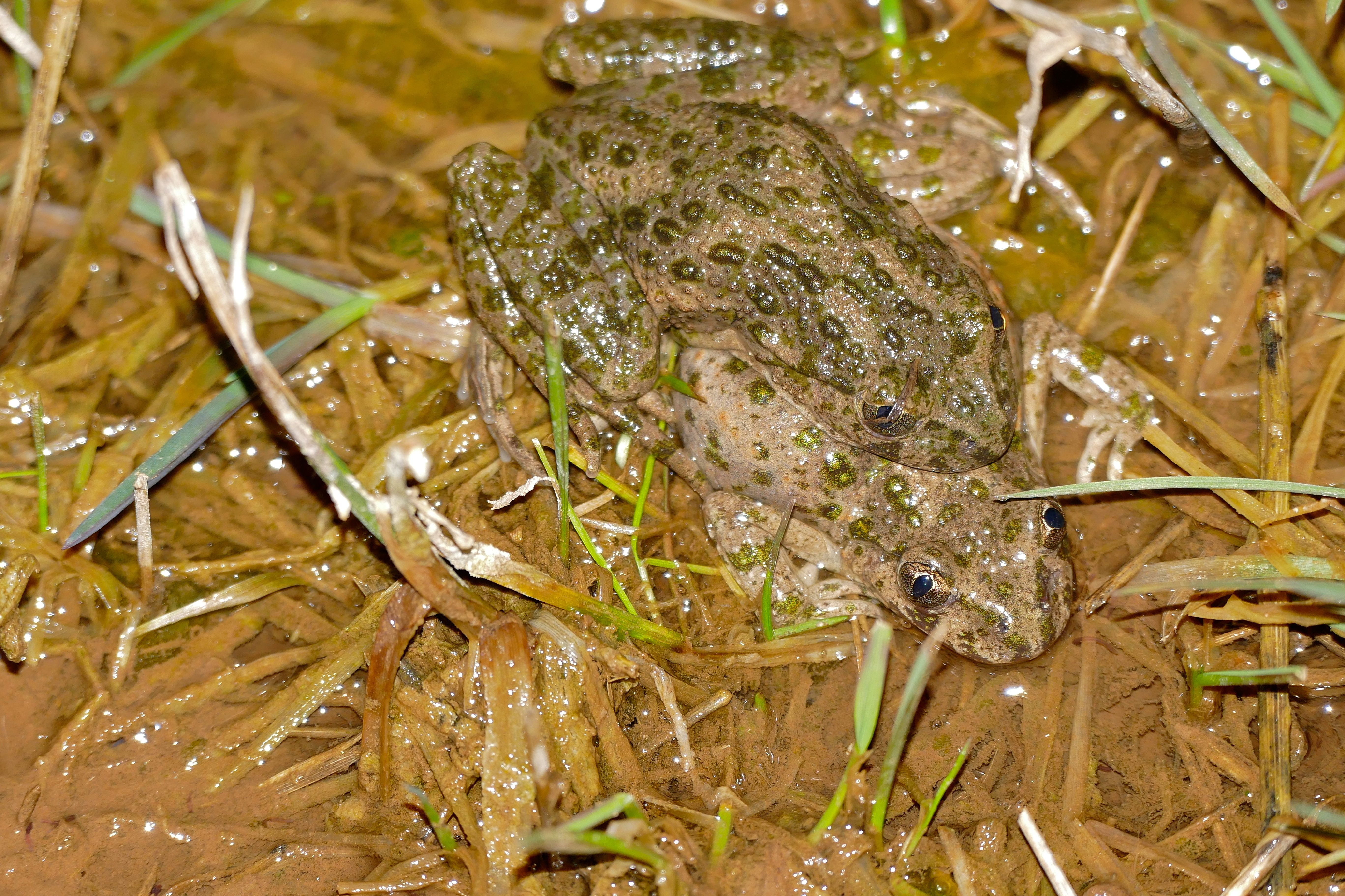 Lac des Rives, Les Rives, Hérault, FRANCE